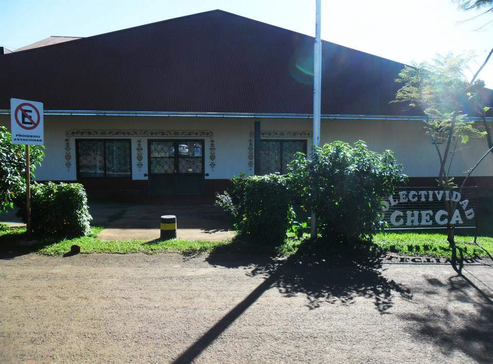 La «Casa Checa» en el Parque de las Naciones de Oberá.